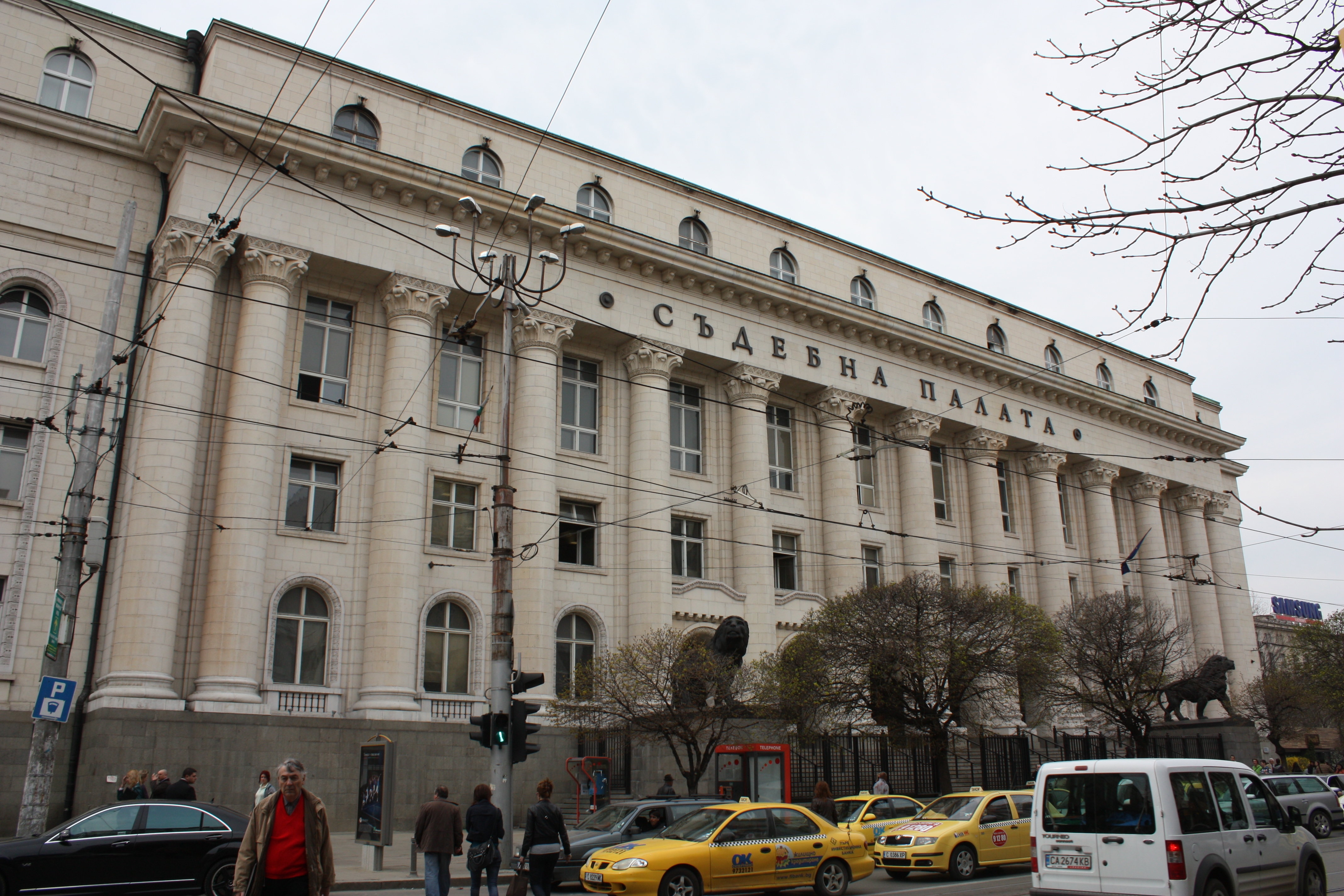 Съдебна Палата София, Palace of Justice, Justizpalast, Sofia, Bulgaria